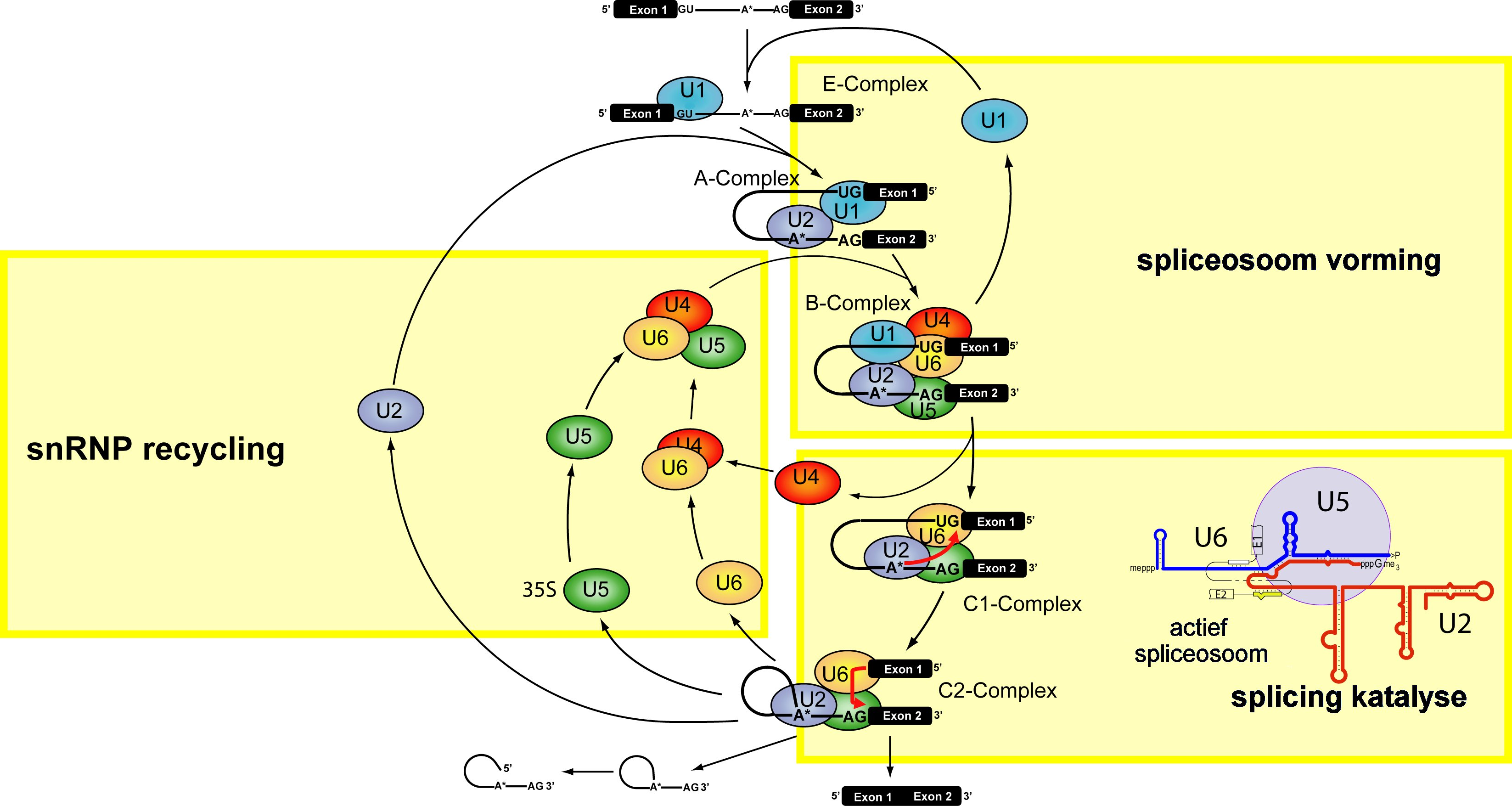 Übersicht über den Spliceosome Zyklus beim Splicing (Entfernen von Introns aus prä-mRNAs)